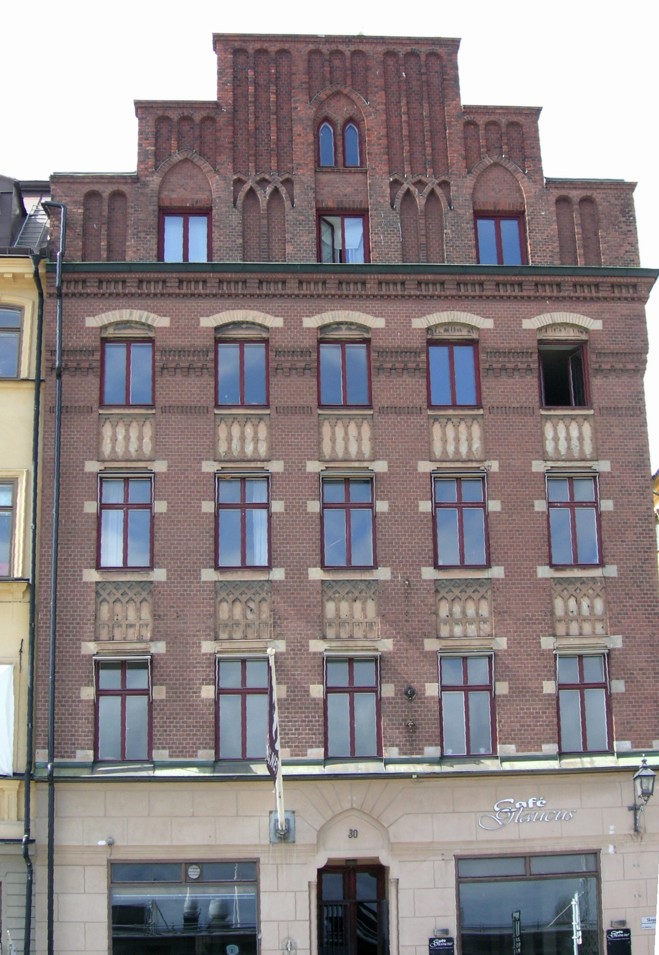 Byggnad "Skeppsbron nr 30" i Stockholm